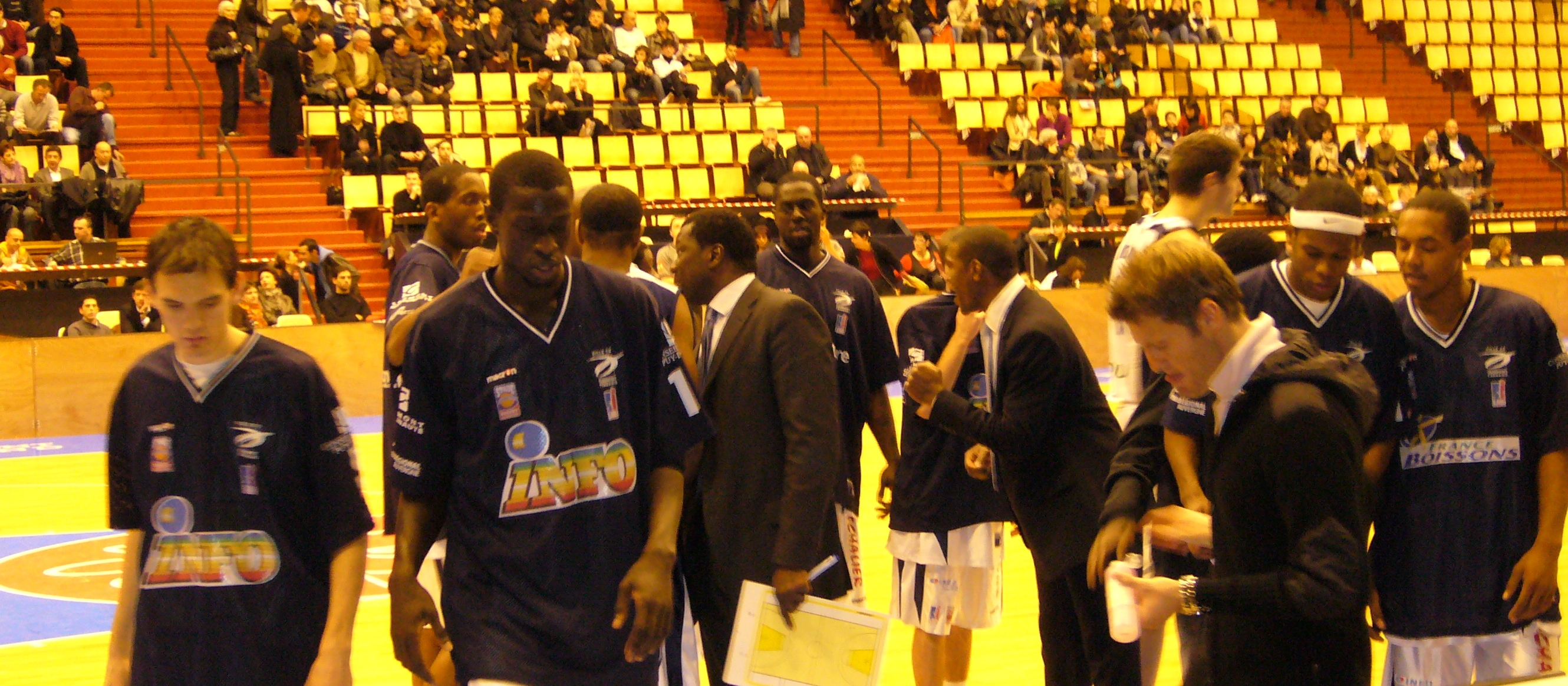 L'équipe français de basket-ball du Stade Clermontois Basket Auvergne